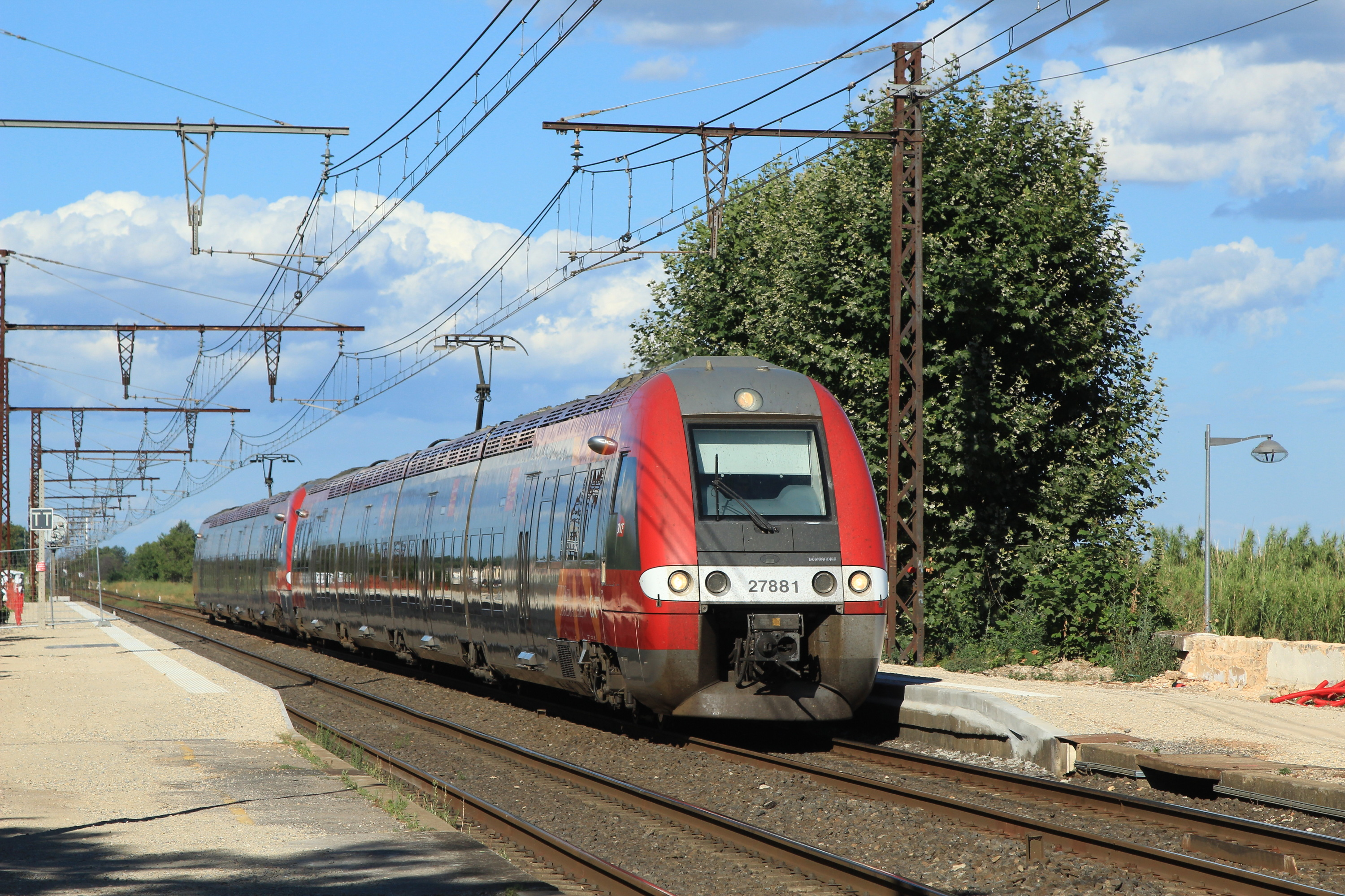 La Z27881 et un autre élément en UM en queue passent sans arrêt la gare de Baillargues sur le TER 876514 (Marseille - Narbonne).